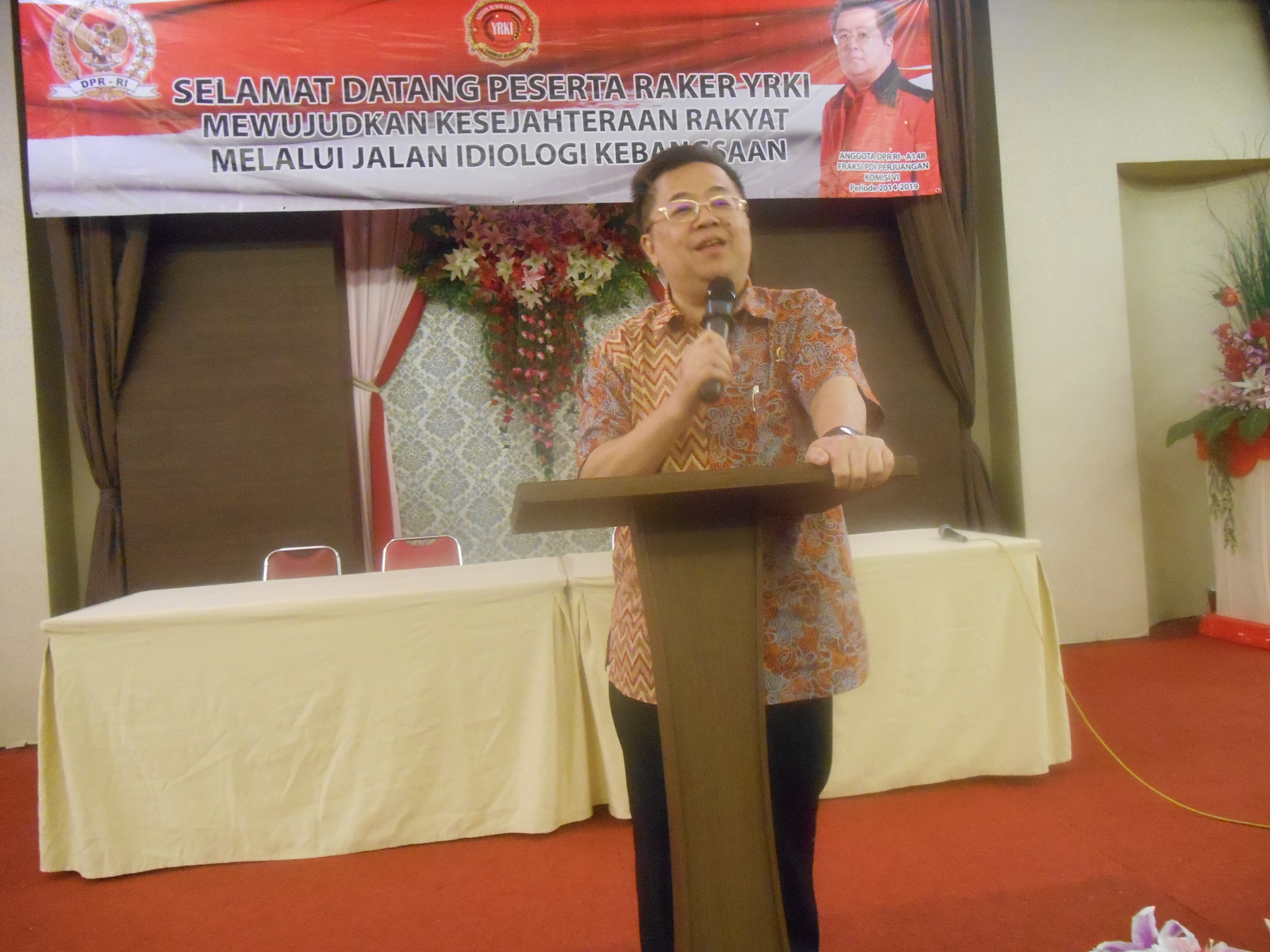 Darmadi Durianto Memberikan arahan kepada peserta